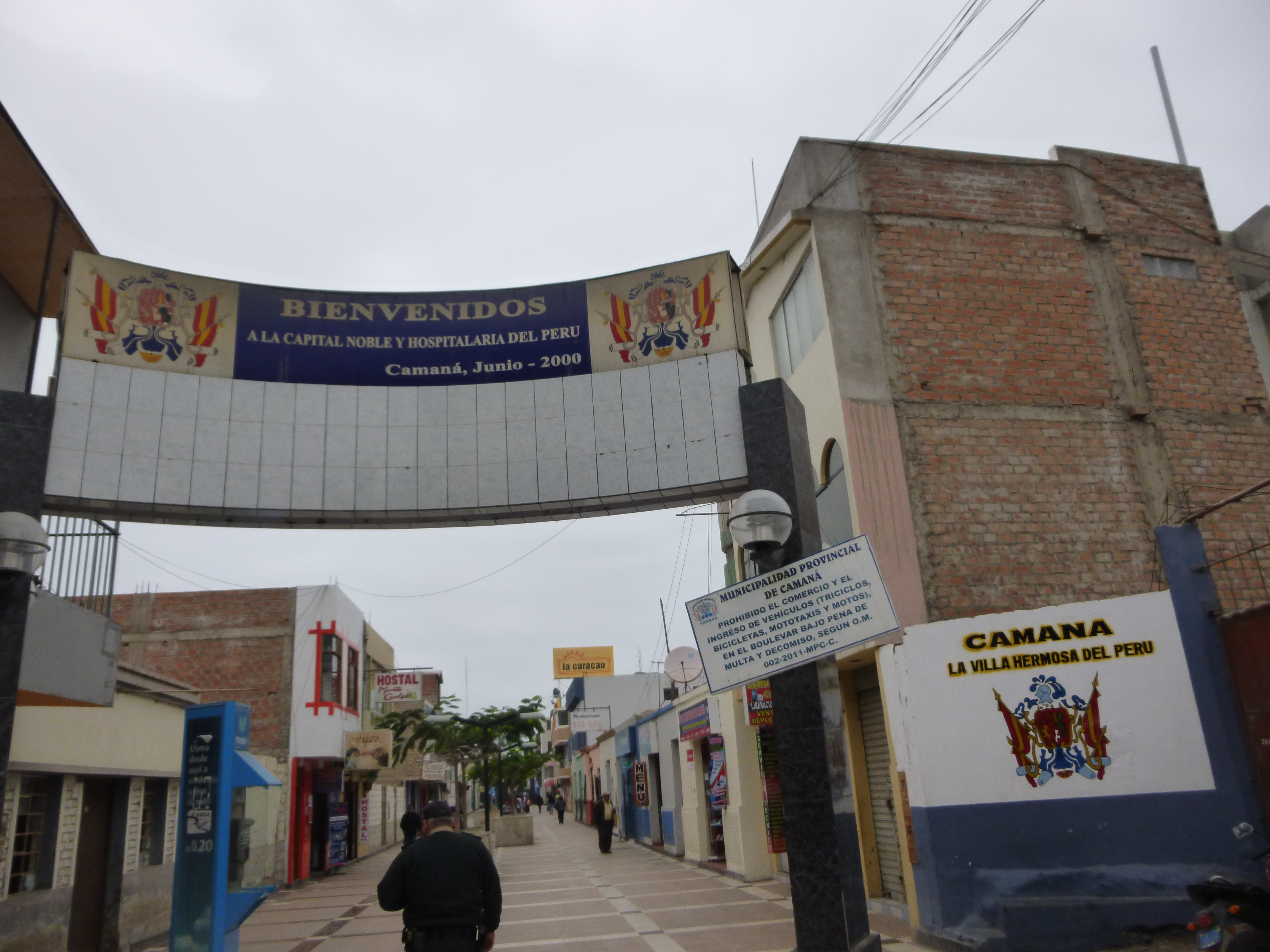 Entrada al Boulevard de la ciudad de Camaná, Arequipa.